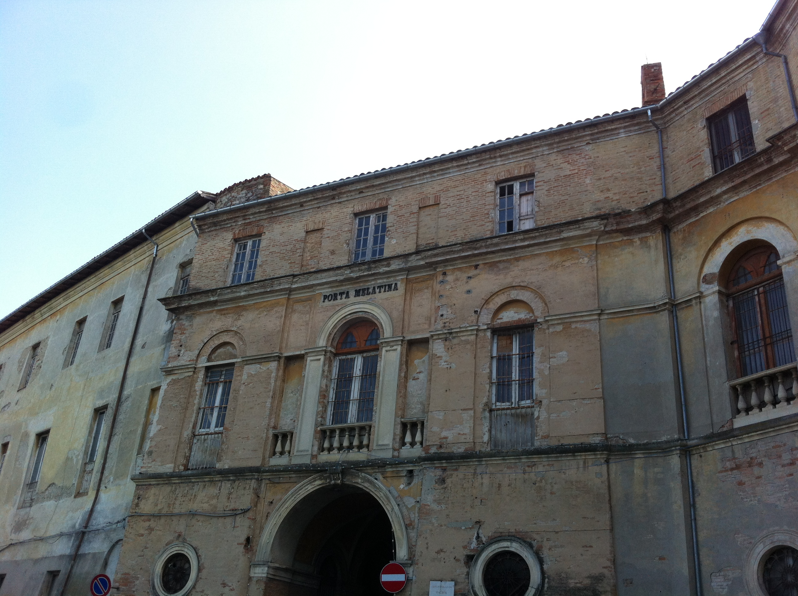 Padiglione di Porta Melatina